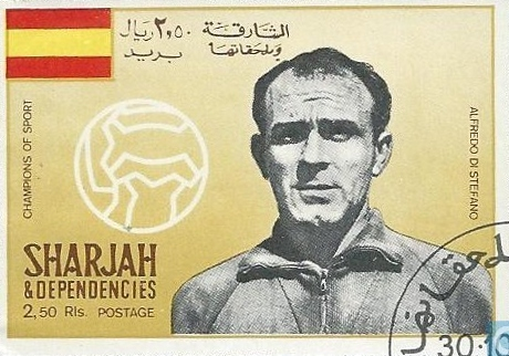 Alfredo Di Stéfano